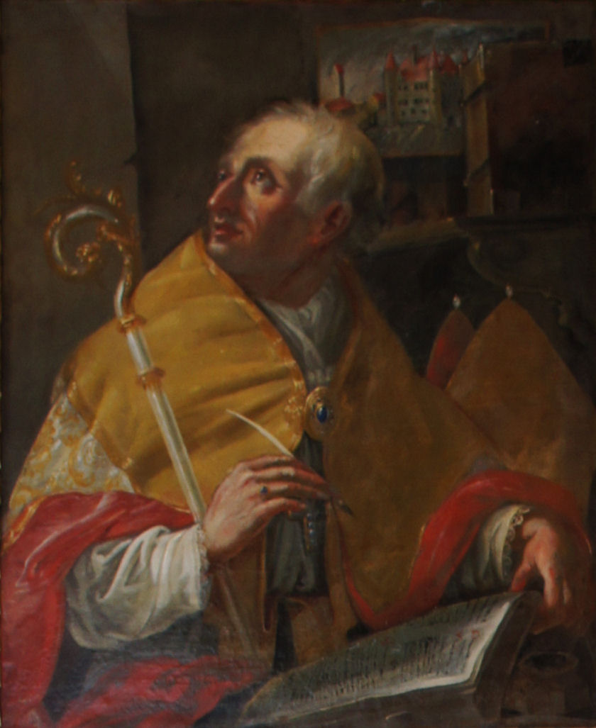 Porträtgemälde von Hitto, Bischof von Freising, im Fürstengang zwischen Fürstbischöflicher Residenz und Freisinger Dom.